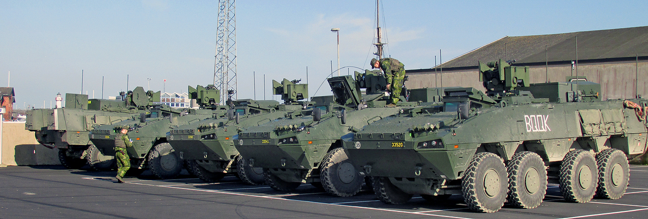 Pansarterrängbil 360. Ystad 15 april 2015.